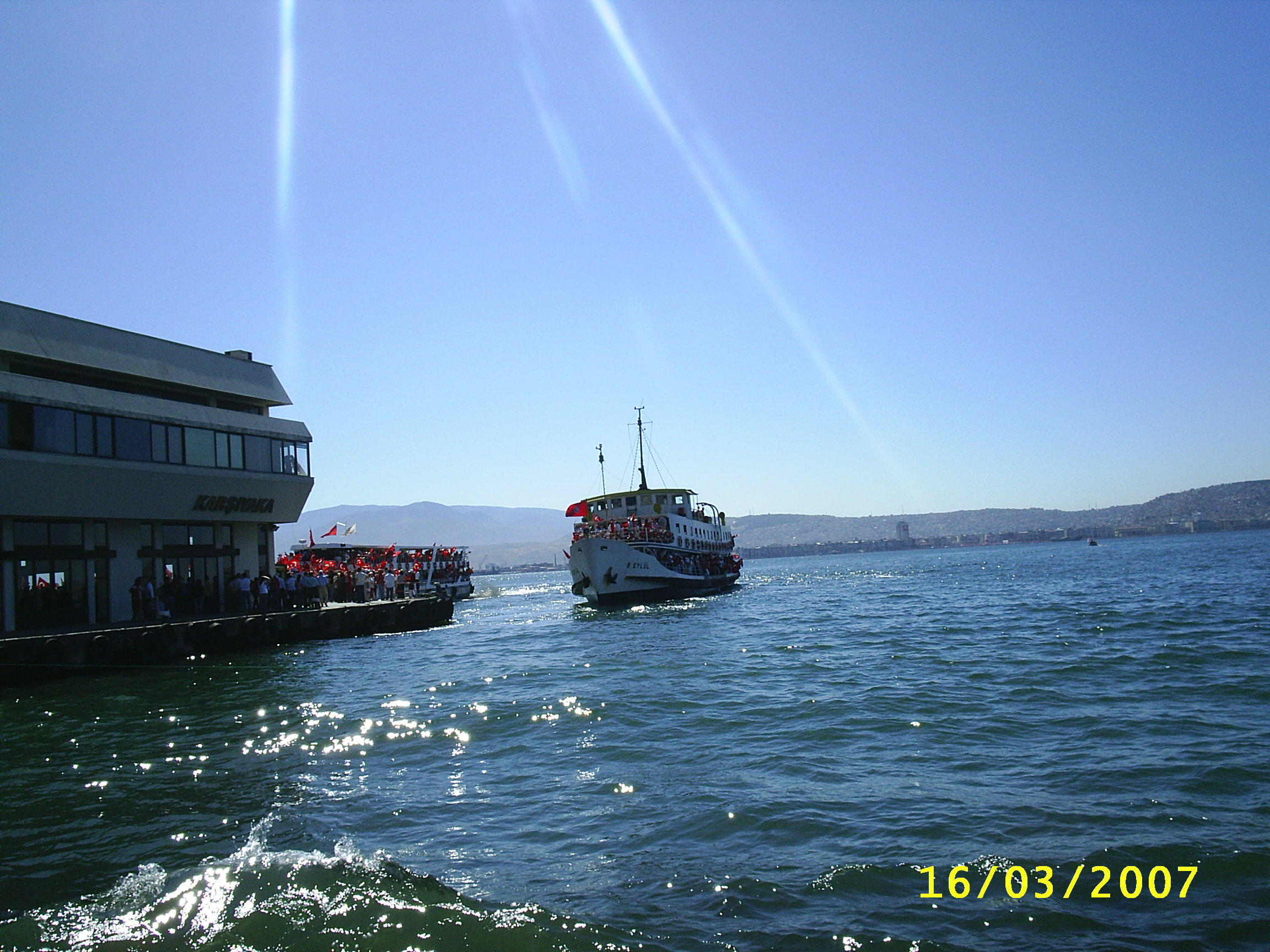 Protect Your Republic Protest, Gündoğdu square, İzmir